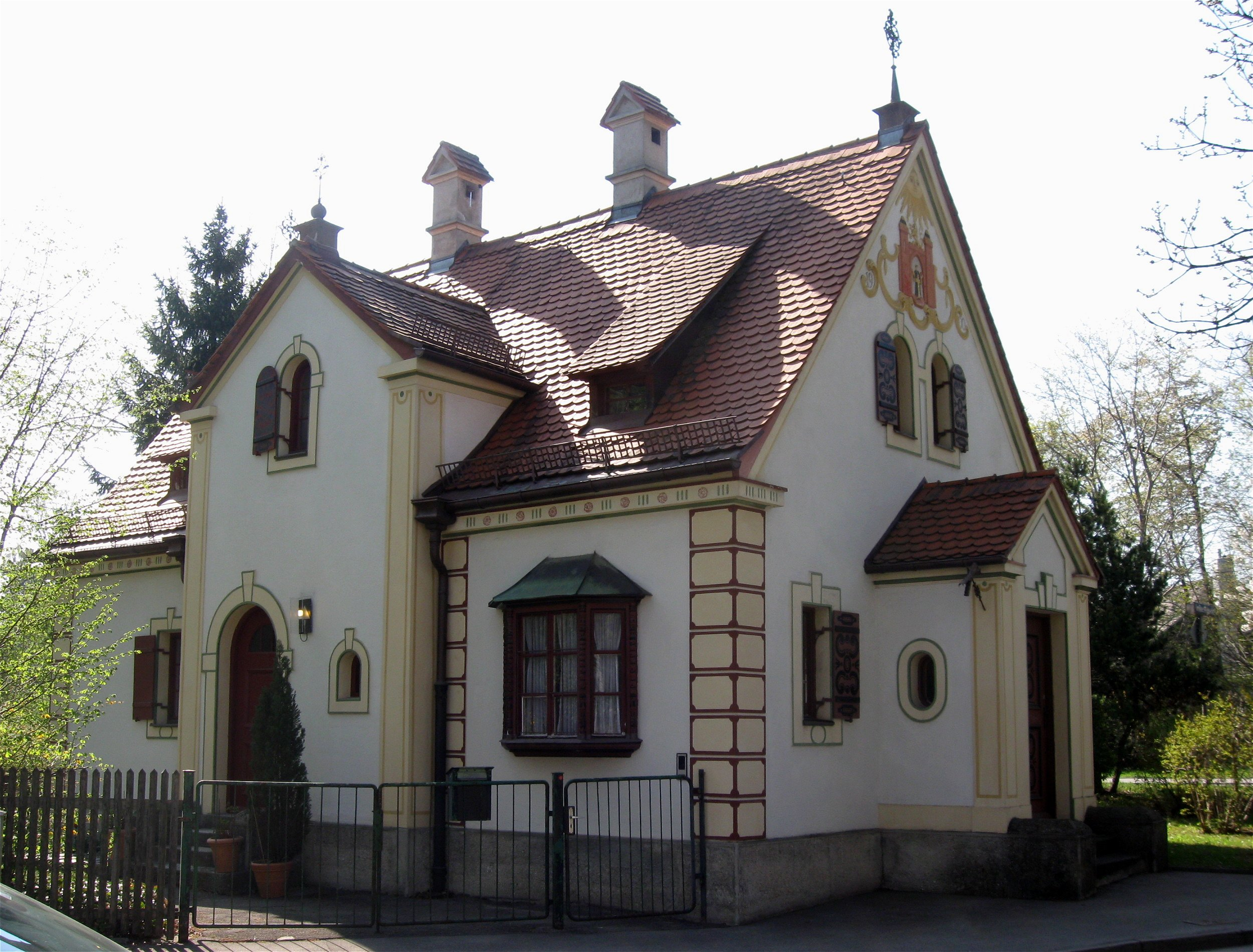 Wolfratshauser Straße 139; Ehem. Zollhaus, malerischer, erdgeschossiger Bau in deutscher Renaissance, bez. 1900, von Hans Grässel. München